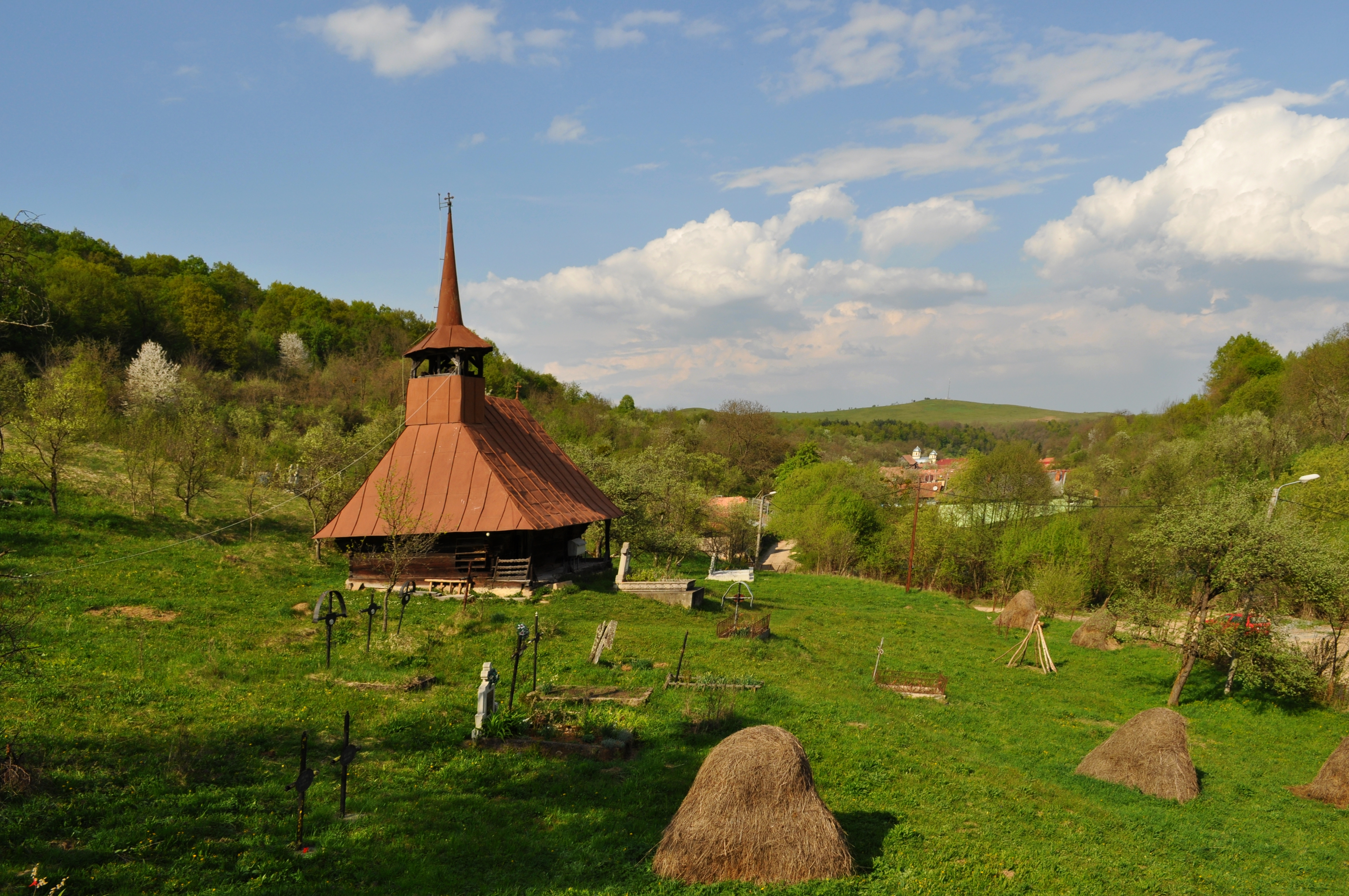 Biserica de lemn din Stolna, județul Cluj